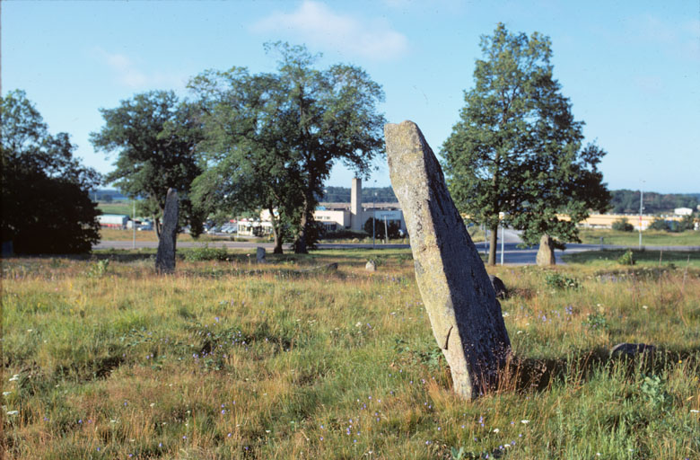 Rest sten på forntida gravfält. Motiv: Karlskrona 68:1 Kategori: Gravfält Rest sten på forntida gravfält. Karlskrona 68:1.